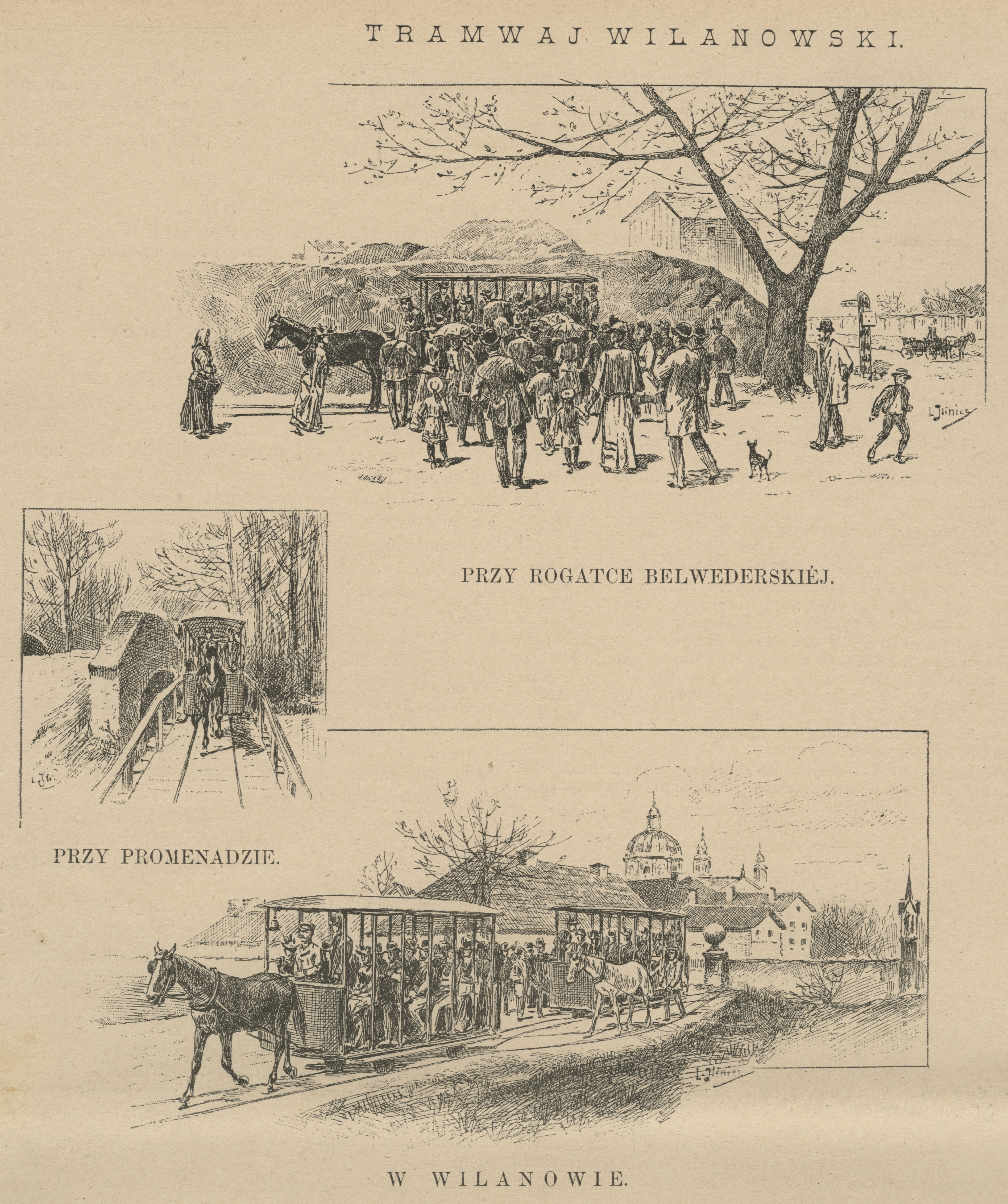 Tramwaj wilanowski